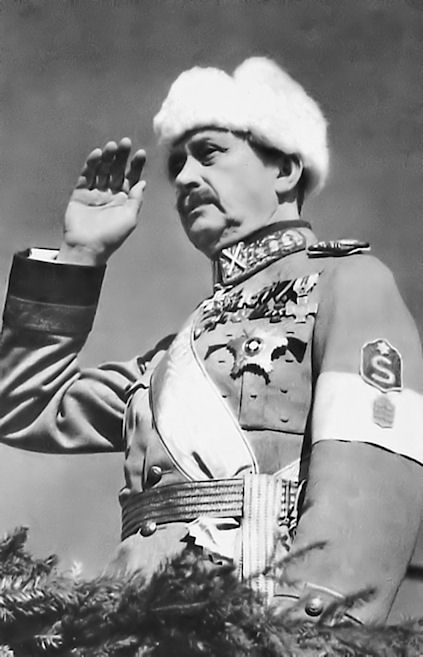 Suomen marsalkka Mannerheim.